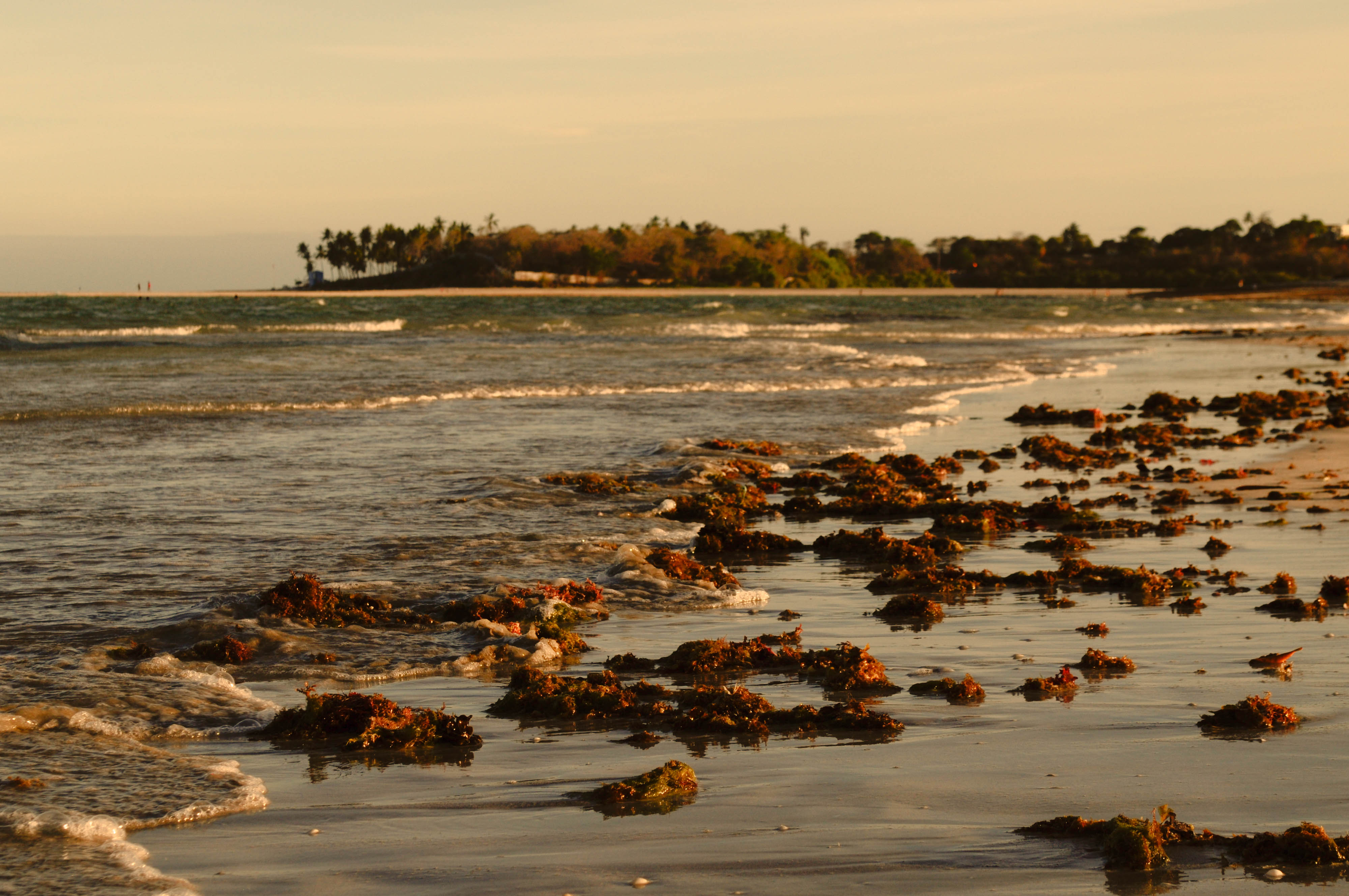 Vista da Praia do Sossego para Jaguaribe, tirada em janeiro de 2017.